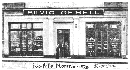 Haus von Silvio Gesell in Buenos Aires (Argentinien)